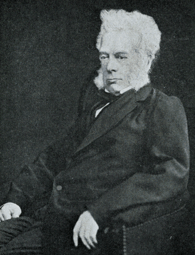 A.N.E. Changuion.